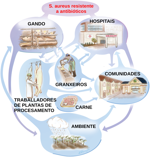 Orixes da resistencia a antibióticos de S. aureus